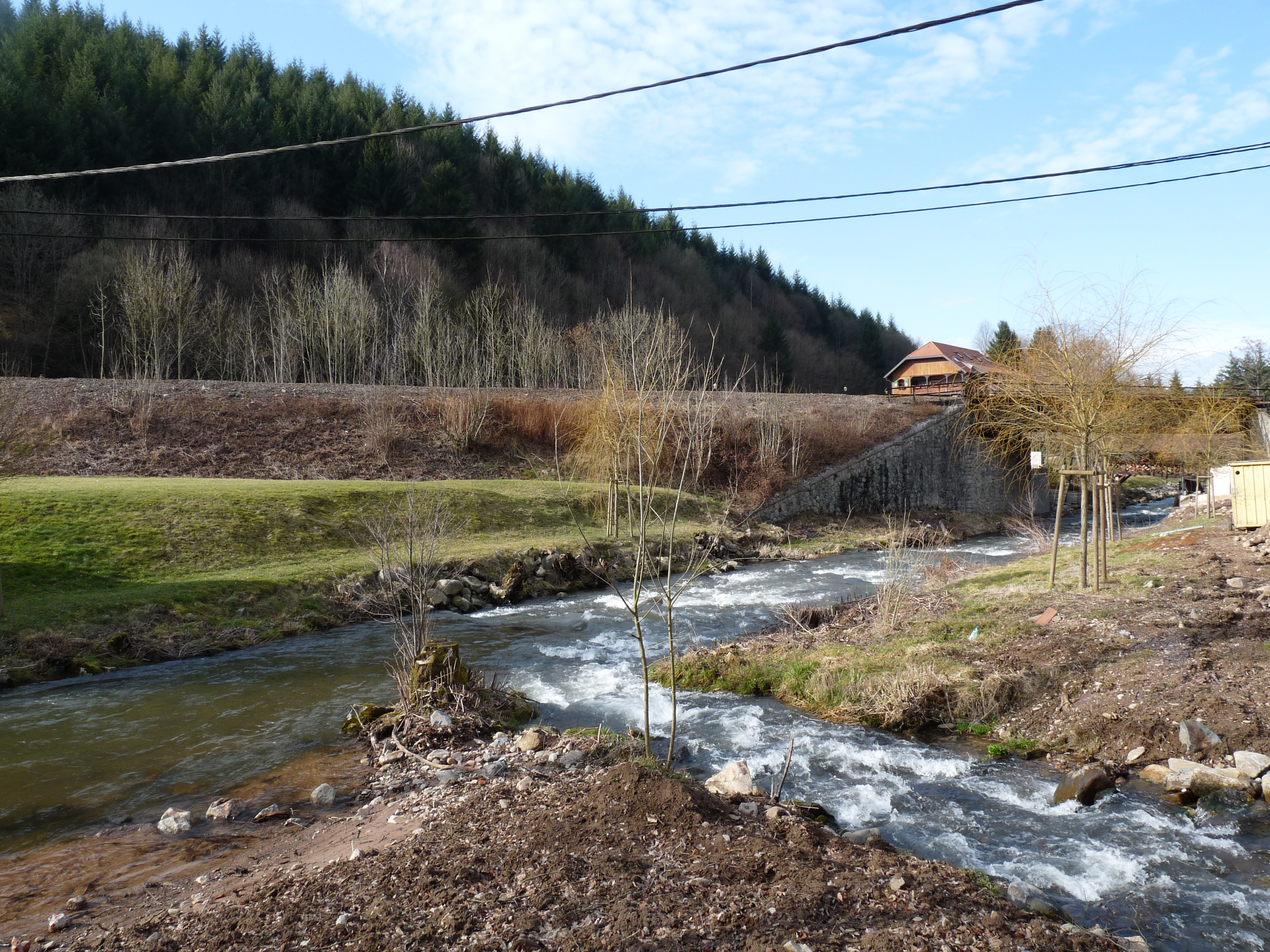 La Bruche (à gauche) alimentée par la Chirgoutte (à droite) à Devant-Fouday (Bas-Rhin)